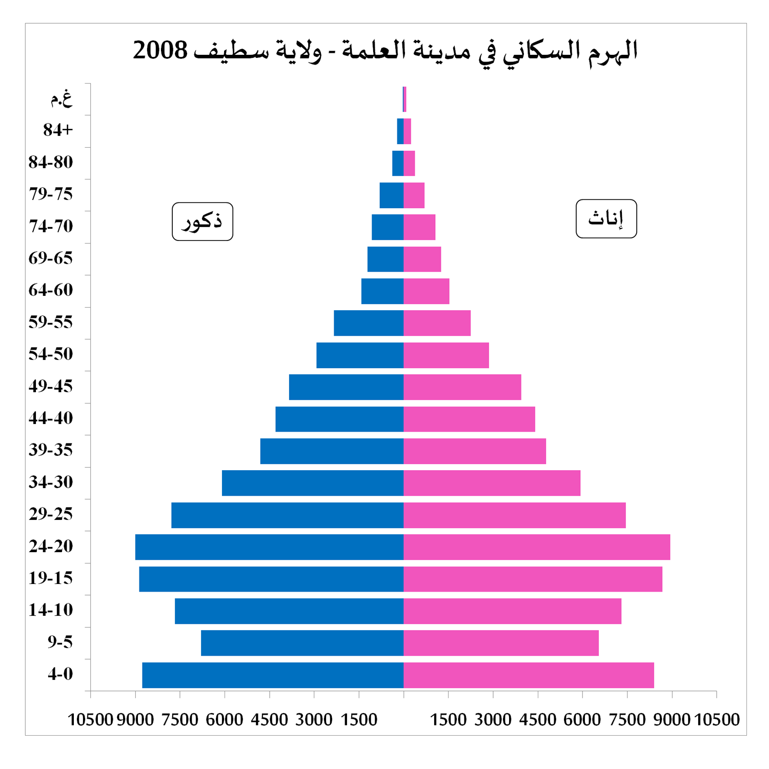 الهرم السكاني لمدينة العلمة ولاية سطيف - الجزائر - 2008